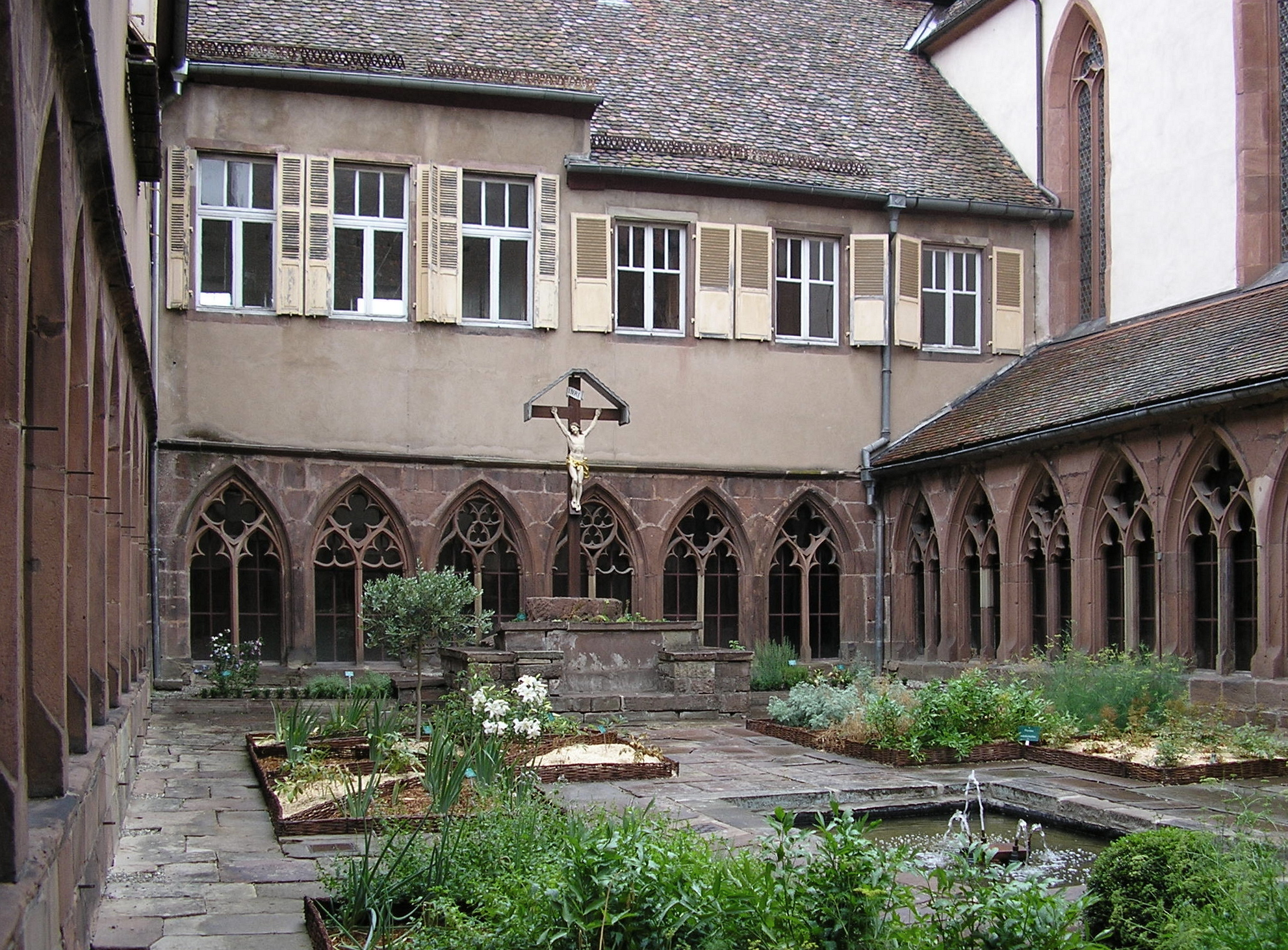 Cloitre des recollets Saverne(Bas_Rhin).